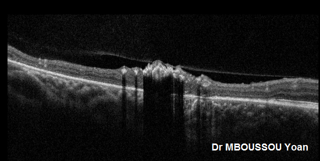 On retrouve un matériel hyperréflectif avec un masque sus jacent au niveau de la rétine interne. La rétine est amincie en périphérie des lésions pigmentées